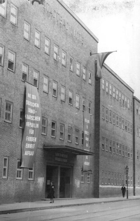 Berlin, Stadtbad Mitte, Hallenbad Berliner Schwimm-Meisterschaften. Am 16. und 19.3.1950 wurden im Stadtbad Mitte die Schwimm- und Springmeisterschaften Berlins vom Deutschen-Sportausschuss und Berliner Schwimmverband durchgeführt. ADN Nr.4422 20.3.1950